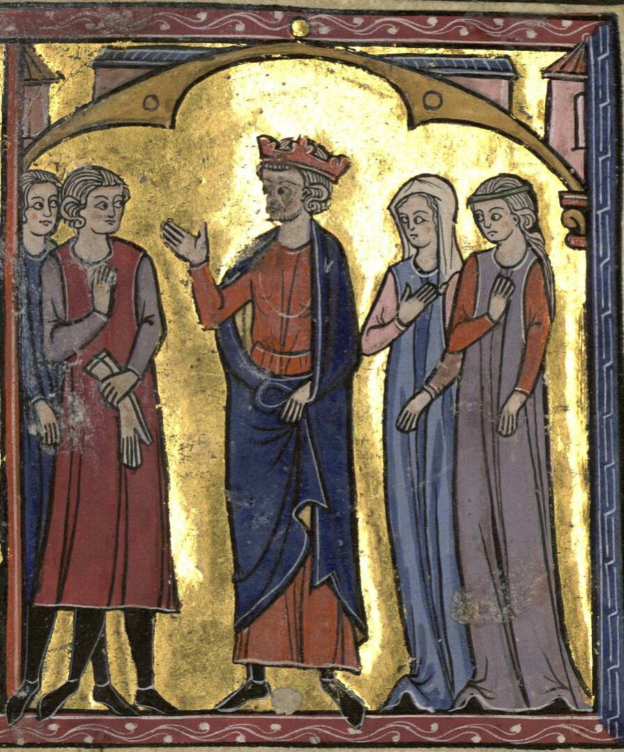 Mariage des filles de philippe 1